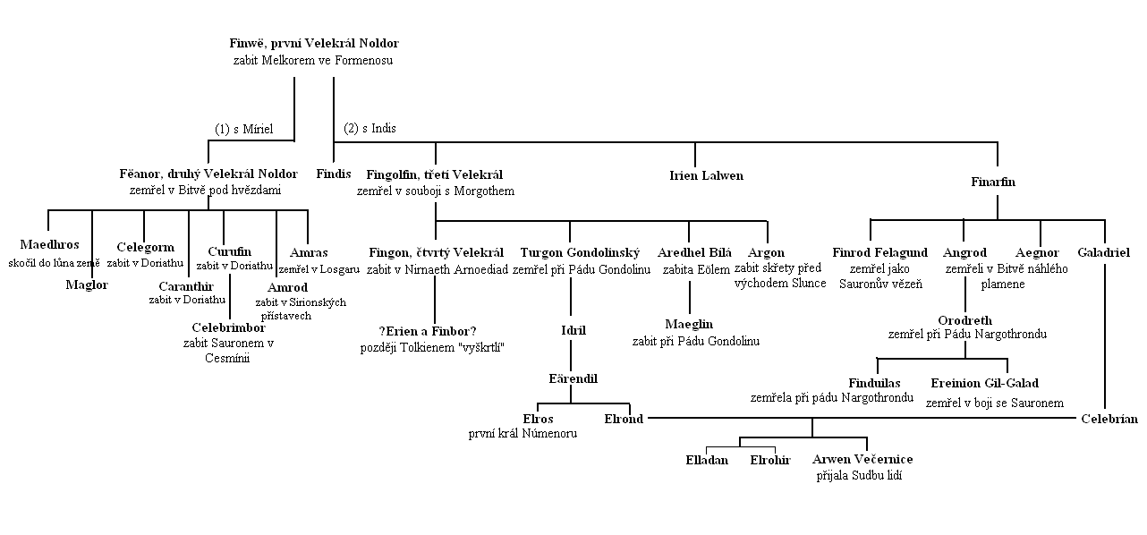 Rodokmen Finwëho, prvního Velekrále Noldor